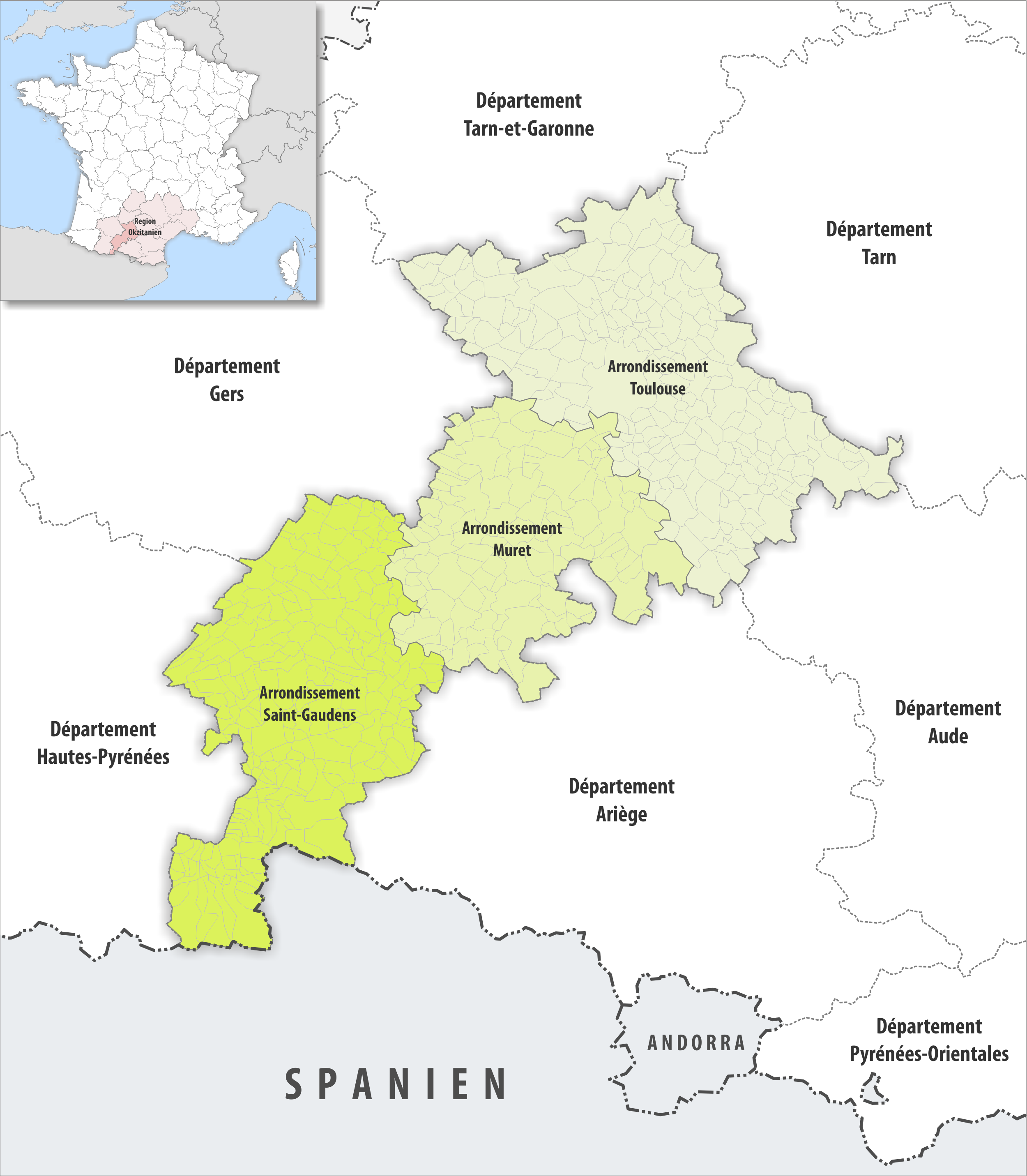 Gemeinden und Arrondissemente im Departement Haute-Garonne